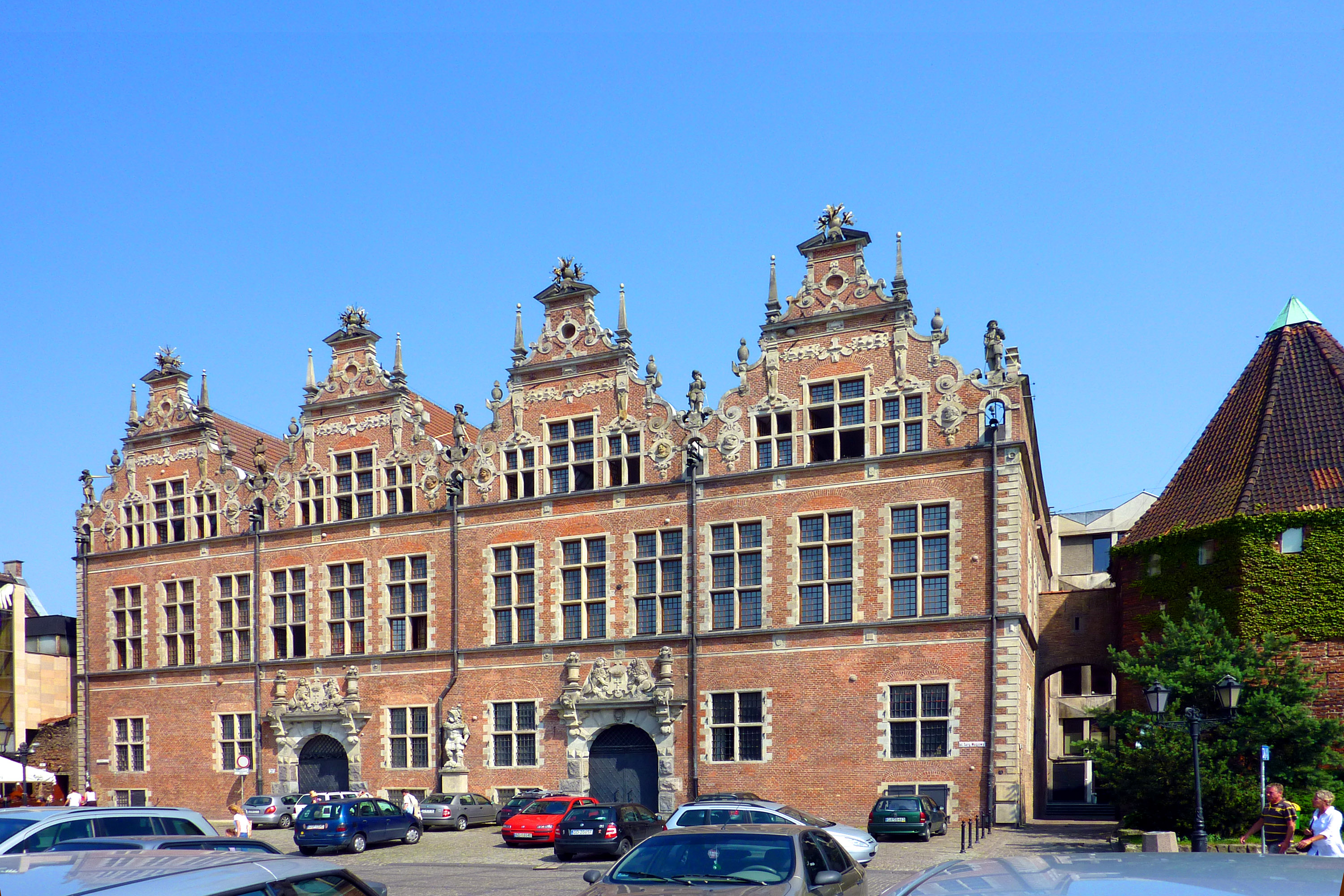 Gdańsk Główne Miasto, Targ Węglowy - Wielka Zbrojownia ze studnią, obecnie ASP, 1602-1605 (widok od strony Targu Węglowego)